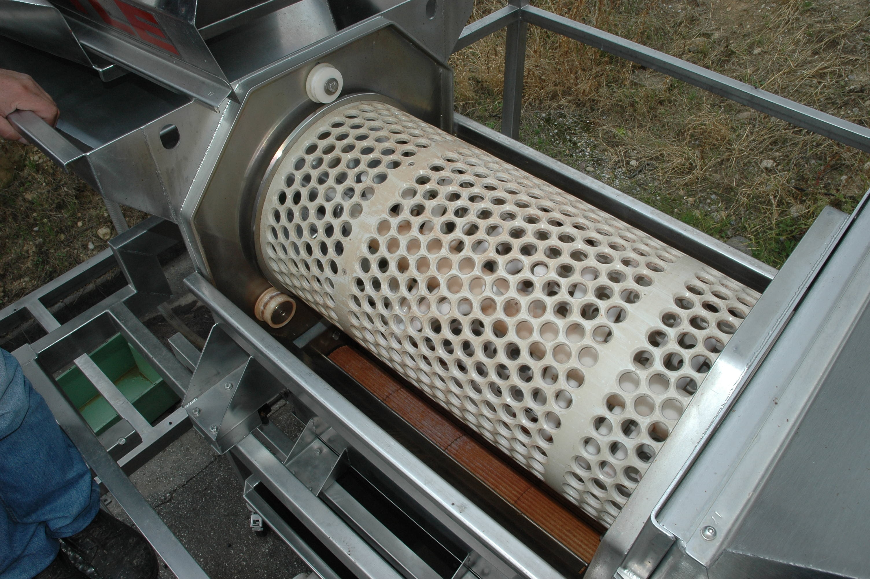 Abbeermaschine für Trauben - Aufsicht auf den Gitterkorb mit Sternwalze und den darunterliegenden Quetschwalzen.